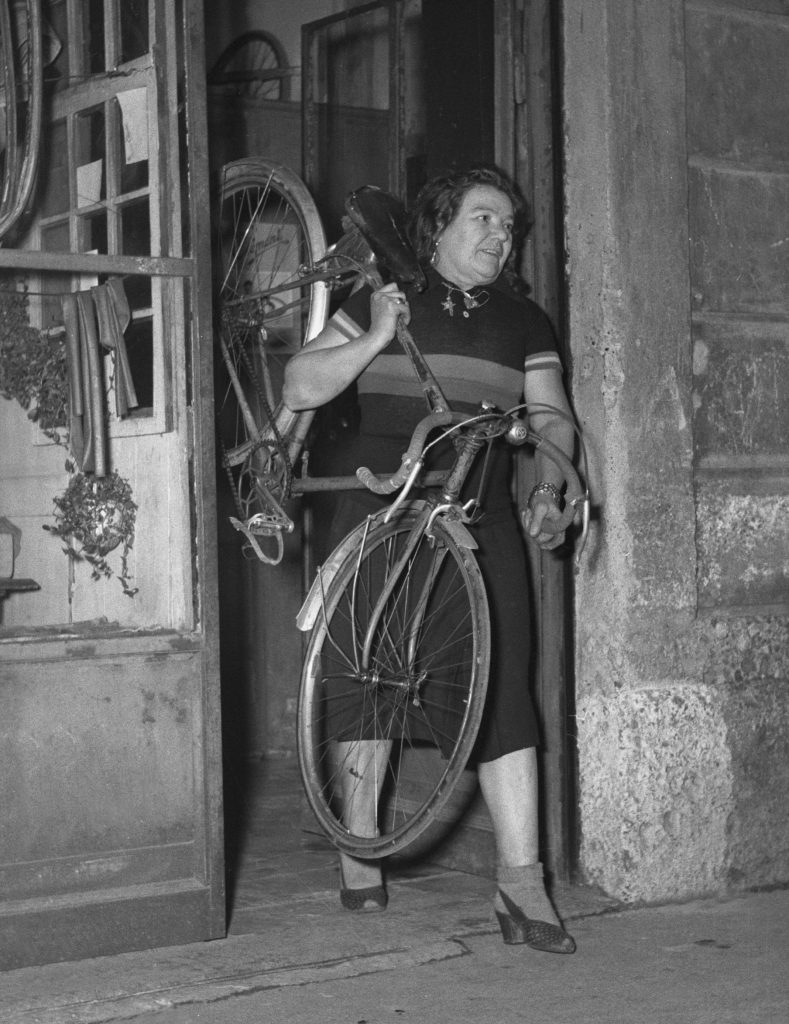 L'ex ciclista Alfonsina Strada (Alfonsa Rosa Maria Morini) esce dal suo negozio di via Varesina 80 (Milano, 14 novembre 1951)